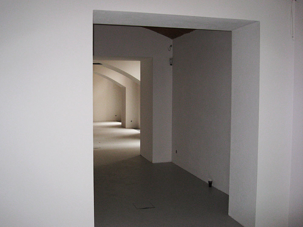 Das "Museum im Rathaus" wurde im Keller des Gleisdorfer Rathauses im Sinne eines "White Cube" eingerichtet und wird ganzjährig mit Ausstellkungen bespielt.